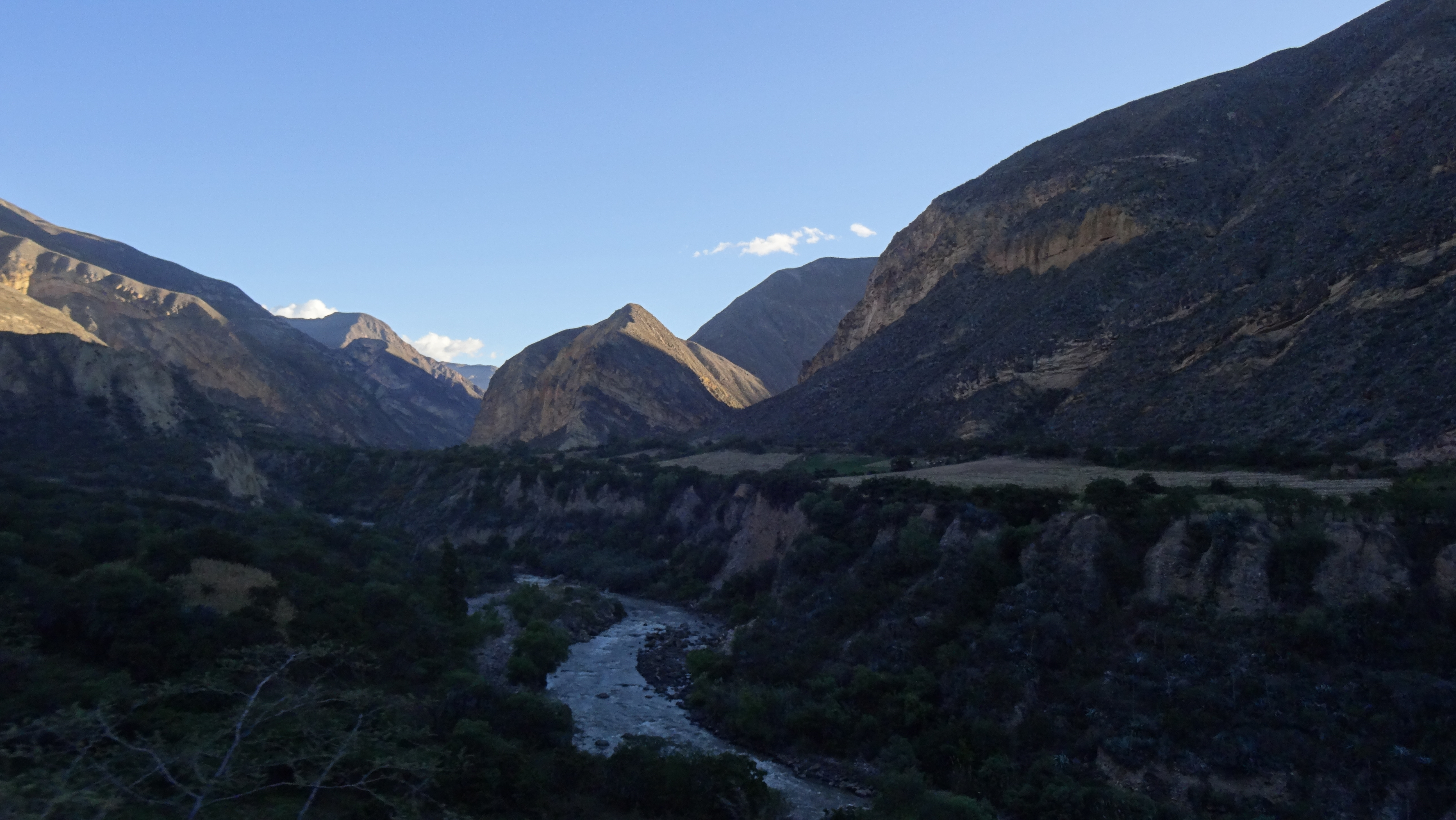 Río Puchca bajo sombras desde la trocha.